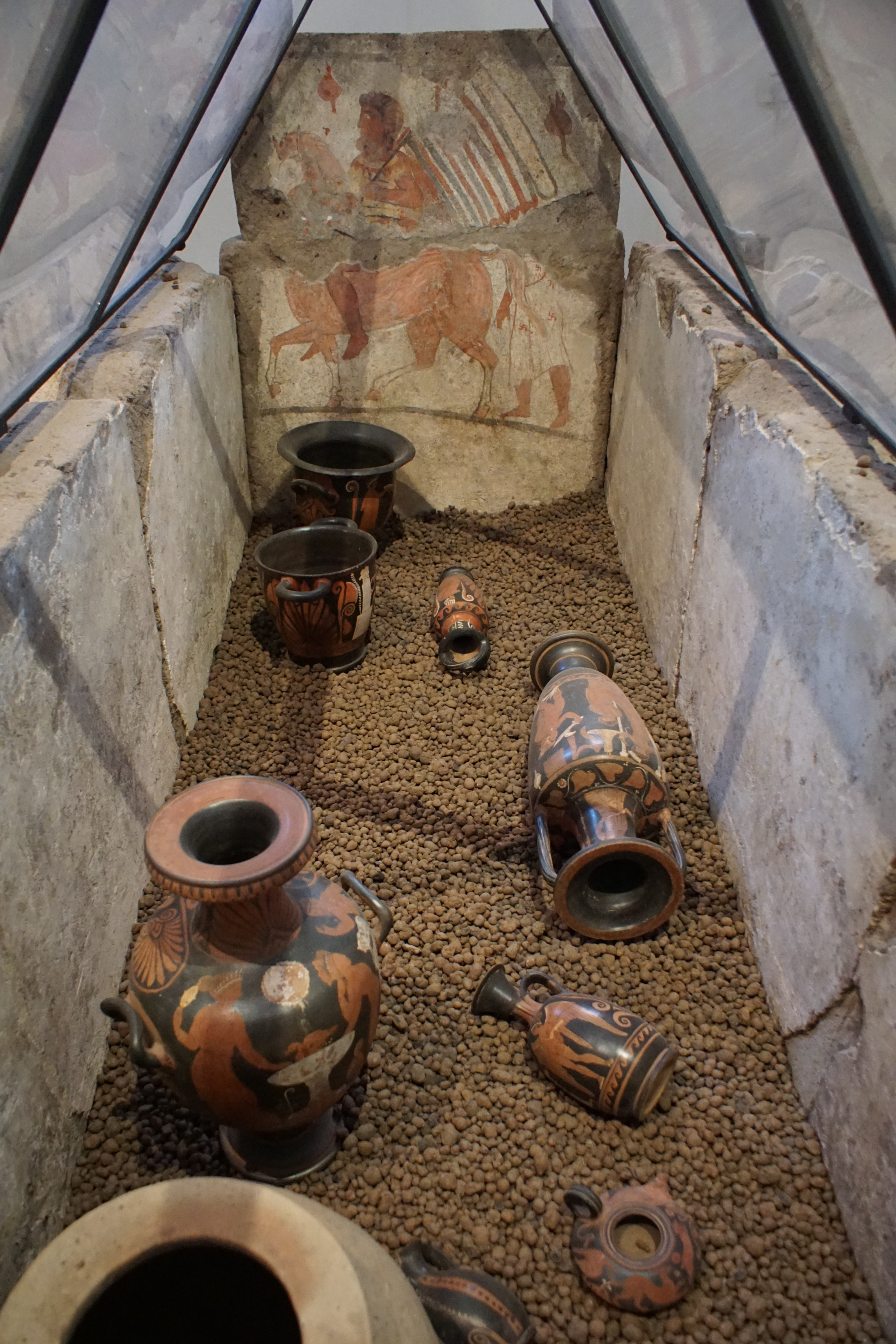 Museo archeologico dell'Antica Capua - MIBAC This is a photo of a monument which is part of cultural heritage of Italy.